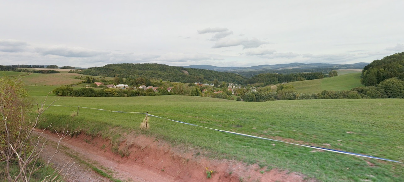 Petrovice